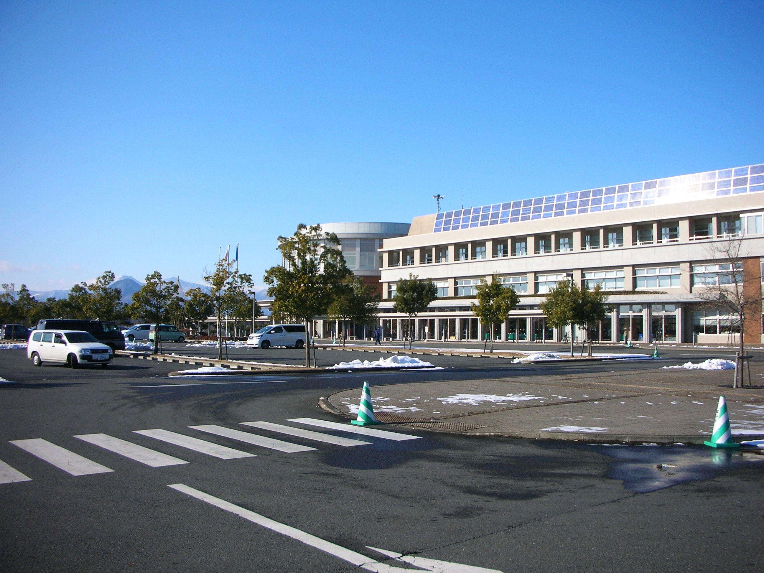 宮城県黒川郡富谷町富谷字坂松田30番地の富谷町役場です。 2015年1月5日撮影